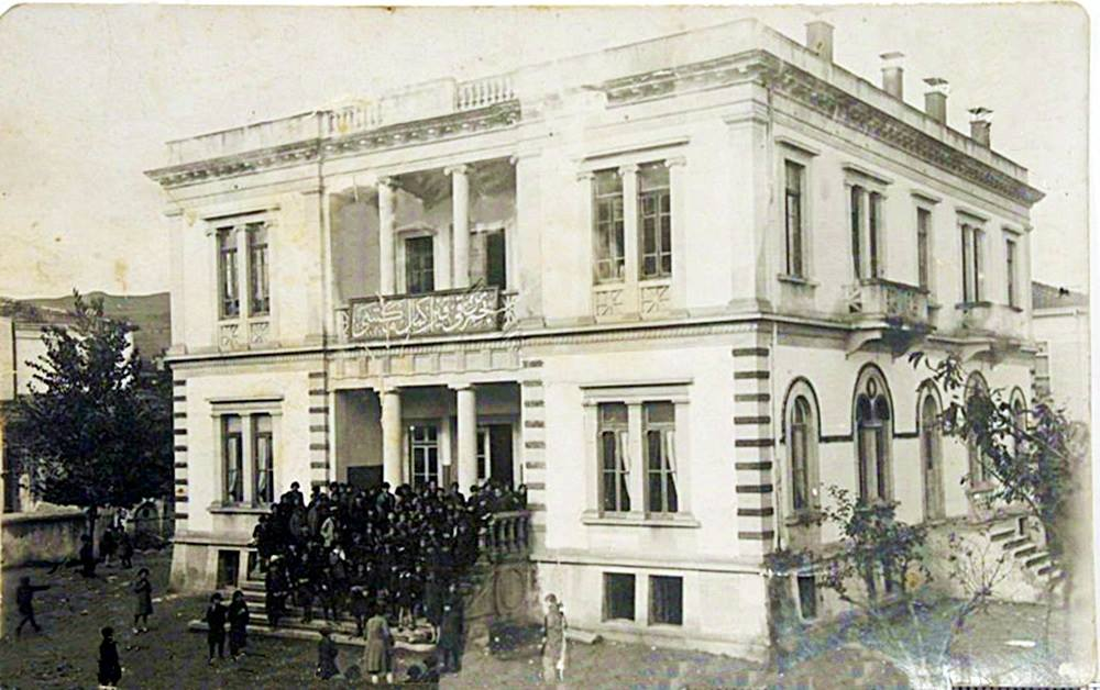 Osmanlı İmparatorluğu döneminde Rum Metropolitliği olarak kullanılması için inşa edilen bina. Daha sonradan Nemci Terakki Kız İkmal Mektebi ve Mithatpaşa Kız Ortaokulu olarak kullanılmıştır. Bina, 1 Aralık 1966 tarihindeki yangınla birlikte tamamen kül olmuştur.